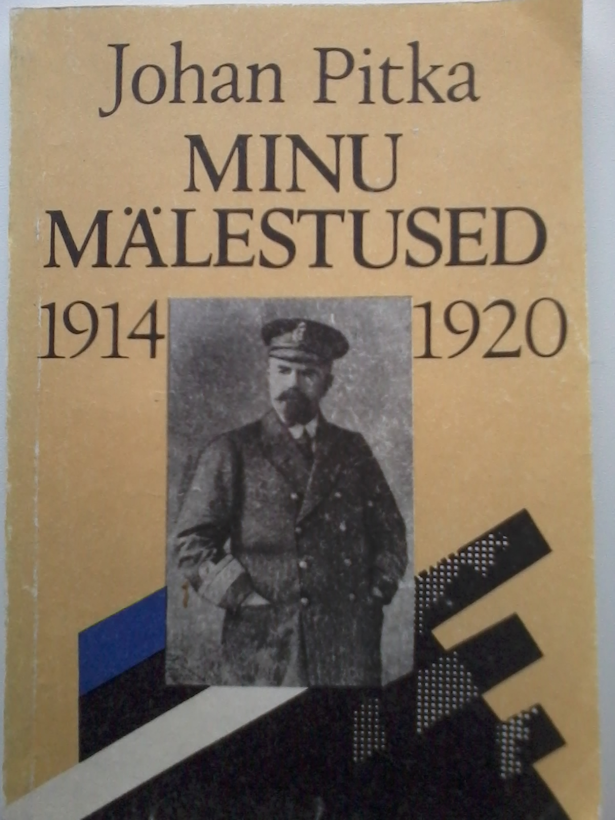 Johan Pitka, "Minu mälestused 1914-1920: Suure Ilmasõja algusest Eesti Vabadussõja lõpuni" (1993)